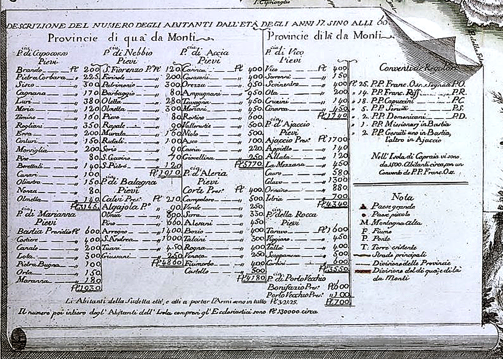 Extrait de la Carta dell'Isola di Corsica par Domenico Policardi (1769) donnant les provinces et pievi de Corse en 1760